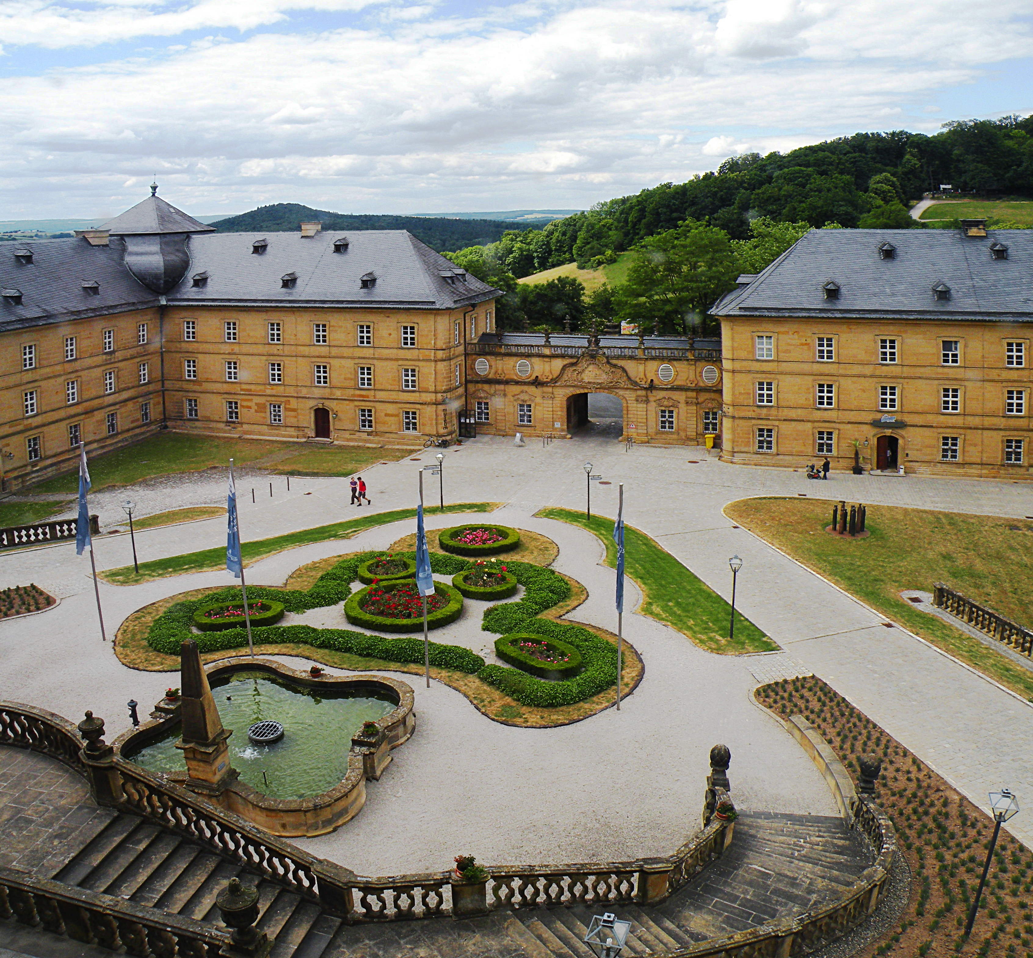 Вид на внутренний двор монастыря Банц